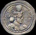 Pièce du règne de Bahram IV